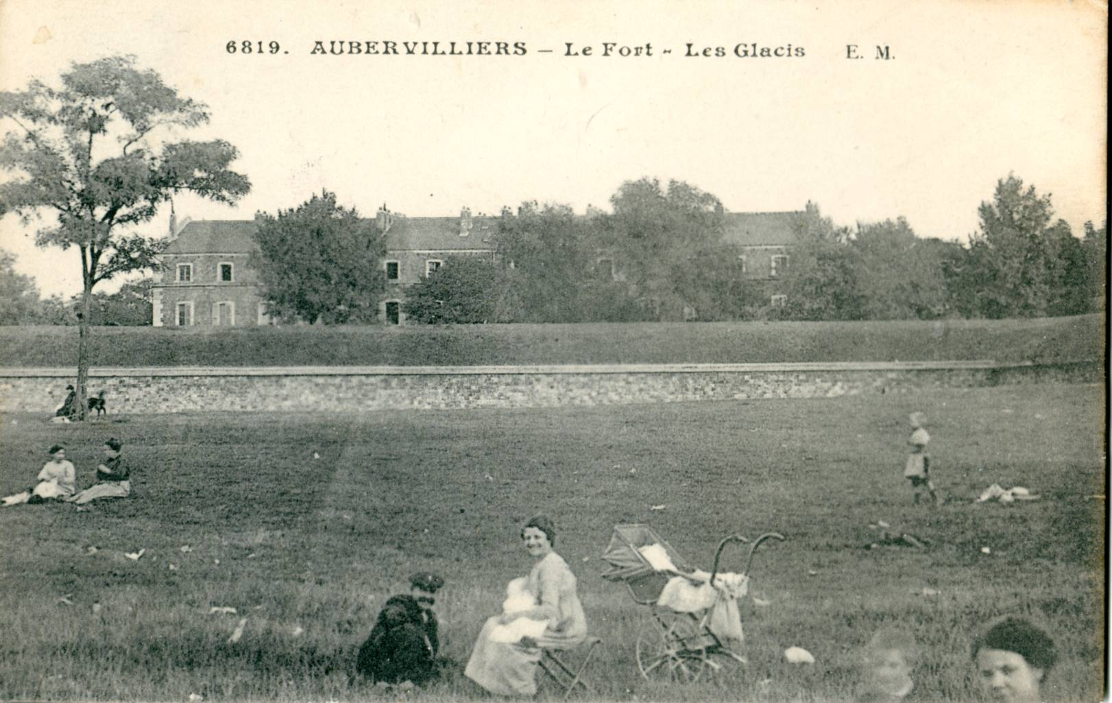 Carte postale ancienne éditée par EM N° 6819 AUBERVILLIERS : Le fort - Les Glacis